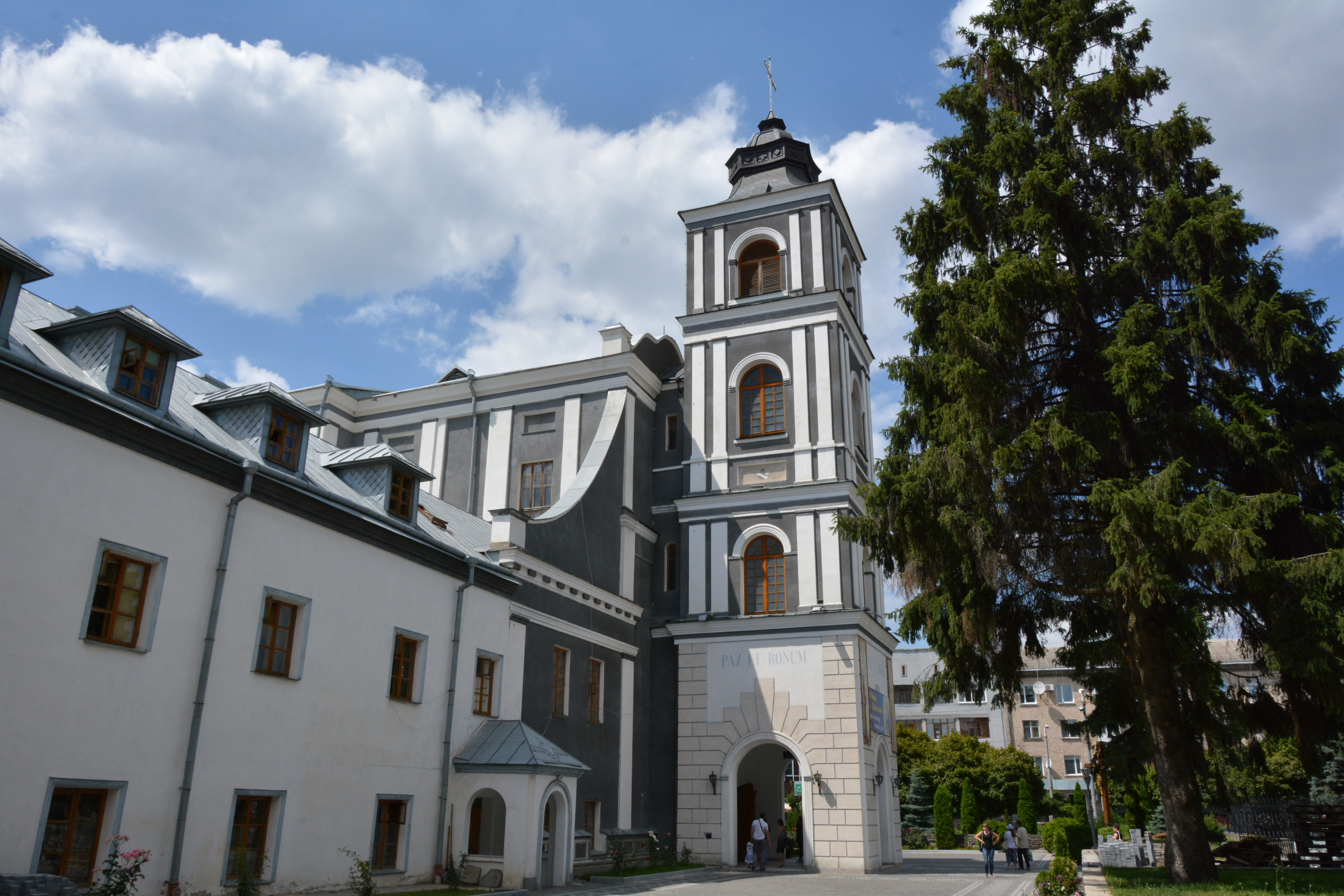 Семінарійський костел Св. Йоана з Дуклі, Житомир, вул. Київська,4